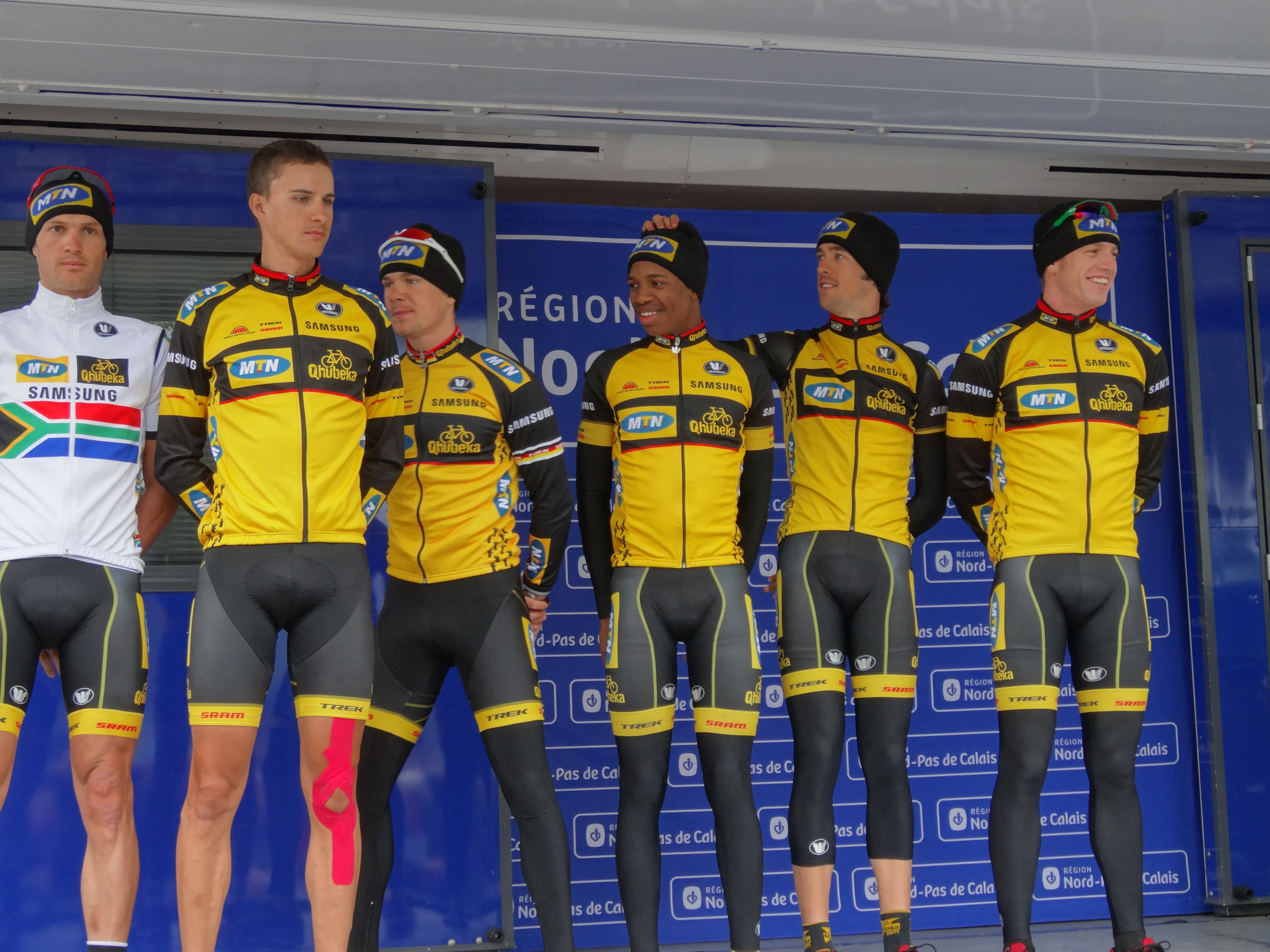 Reportage photographique réalisé le jeudi 2 mai 2013 au départ de la deuxième étape de l'édition 2013 des Quatre jours de Dunkerque au Centre historique minier de Lewarde, Nord, Nord-Pas-de-Calais, France, dans le bassin minier du Nord-Pas-de-Calais. Ce fichier représente un ou plusieurs coureurs cyclistes que JÄNNICK Jérémy n'est pas parvenu à identifier, ou n'a pas eu le temps de le faire. Si vous le reconnaissez, supprimez Quatre jours de Dunkerque 2013|Cycliste non identifié et remplacez le par Depicted person|1= :Category: | et placez Category: , Quatre jours de Dunkerque 2013 en bas de page. Si vous souhaitez qu'un portrait soit généré à partir de cette image, contactez son auteur qui s'en chargera, afin que ce nouveau fichier soit cohérent avec les autres réalisés. Des notes peuvent être utiles pour identifier précisément chaque personne.